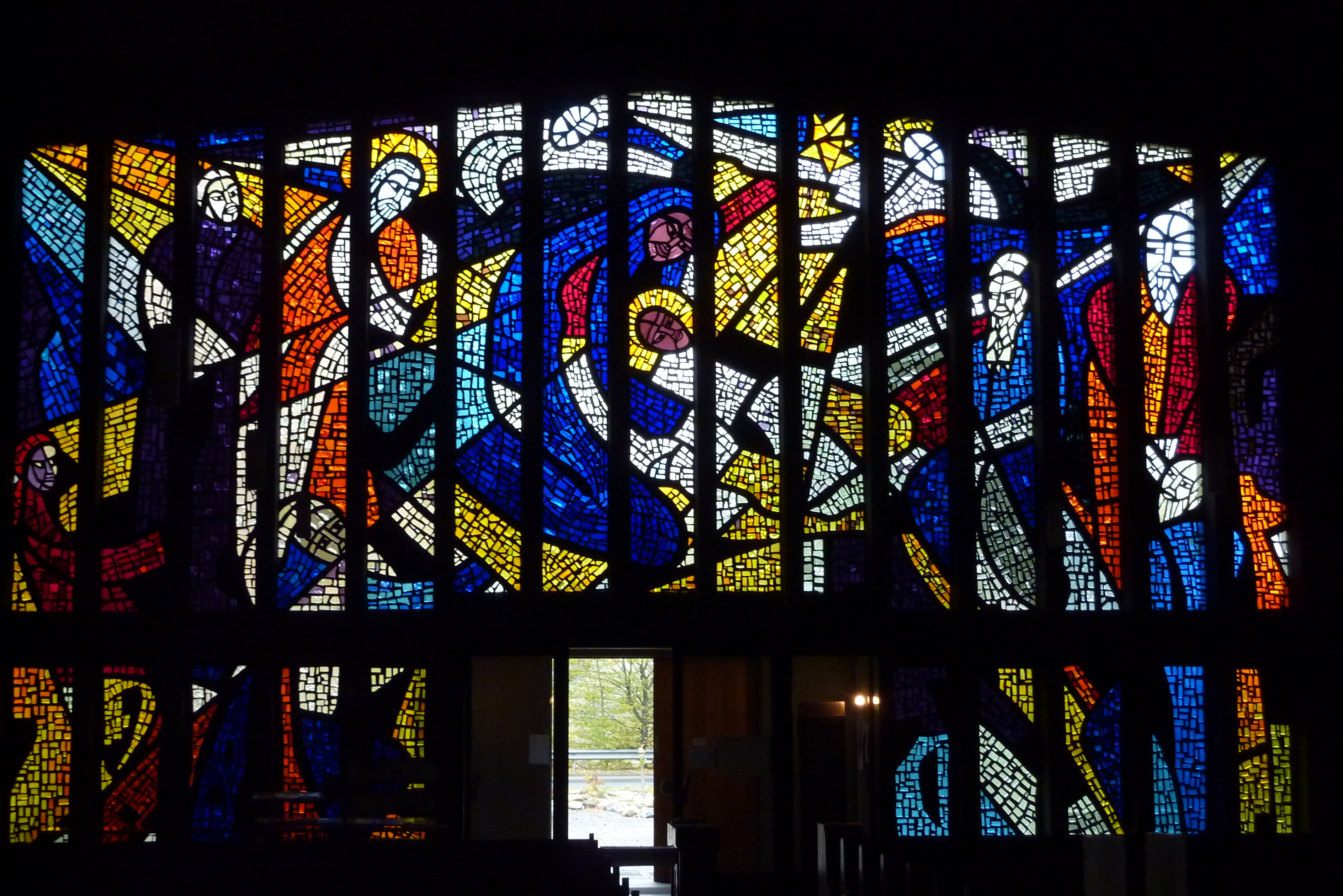 Betonglasfenster in der katholischen Pfarrkirche Heilige Familie in Block